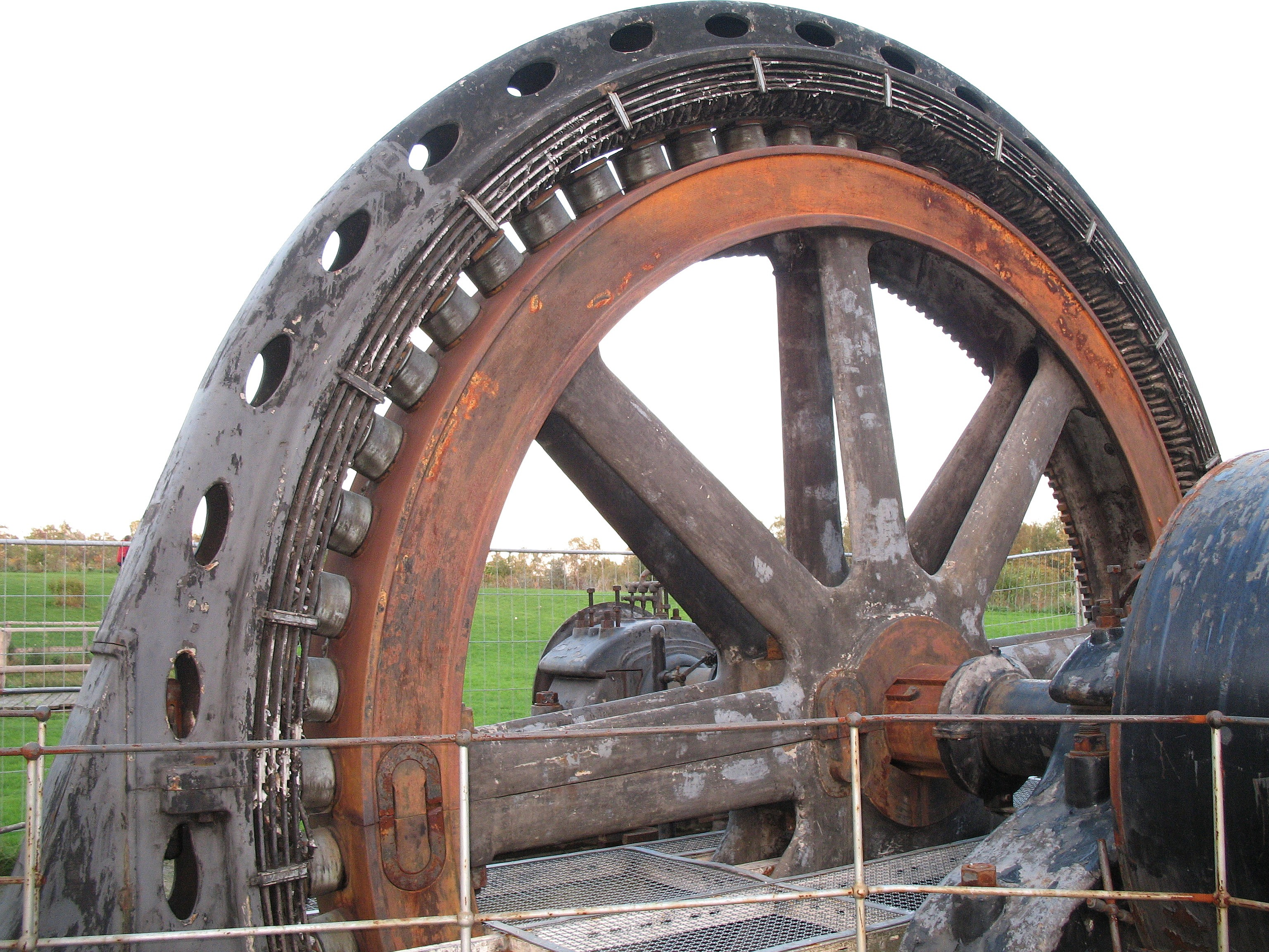 Generator der stillgelegten Steinkohlenzeche "Grube Adolf" bei Herzogenrath-Merkstein